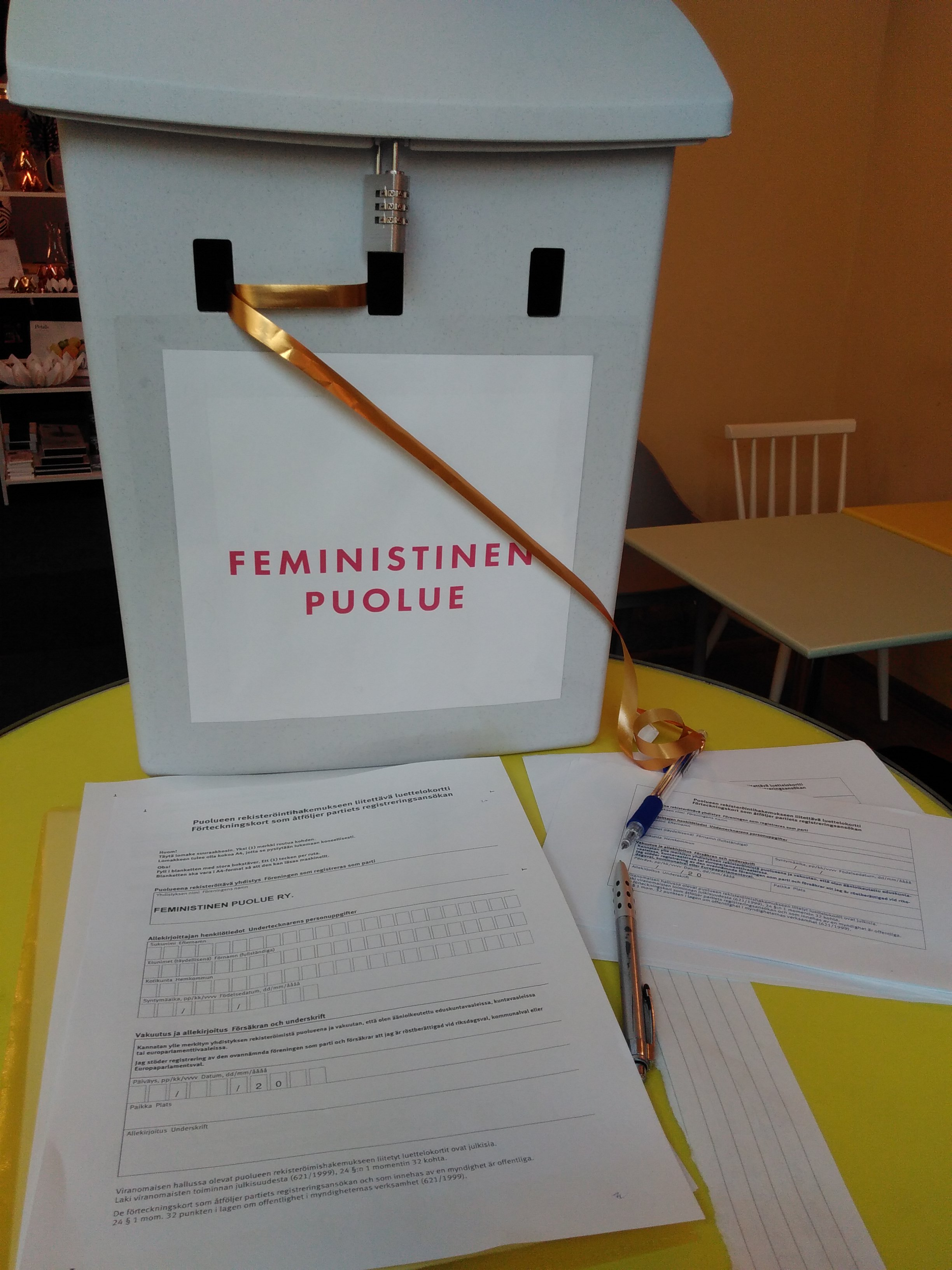 Feministisen puolueen rekiströintihakemus